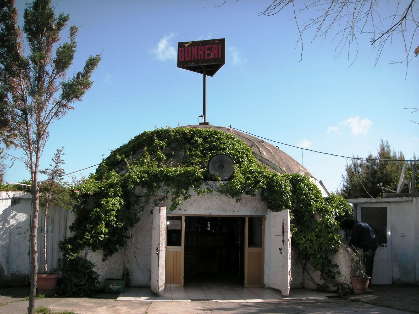 Búnker adaptado como restaurante.